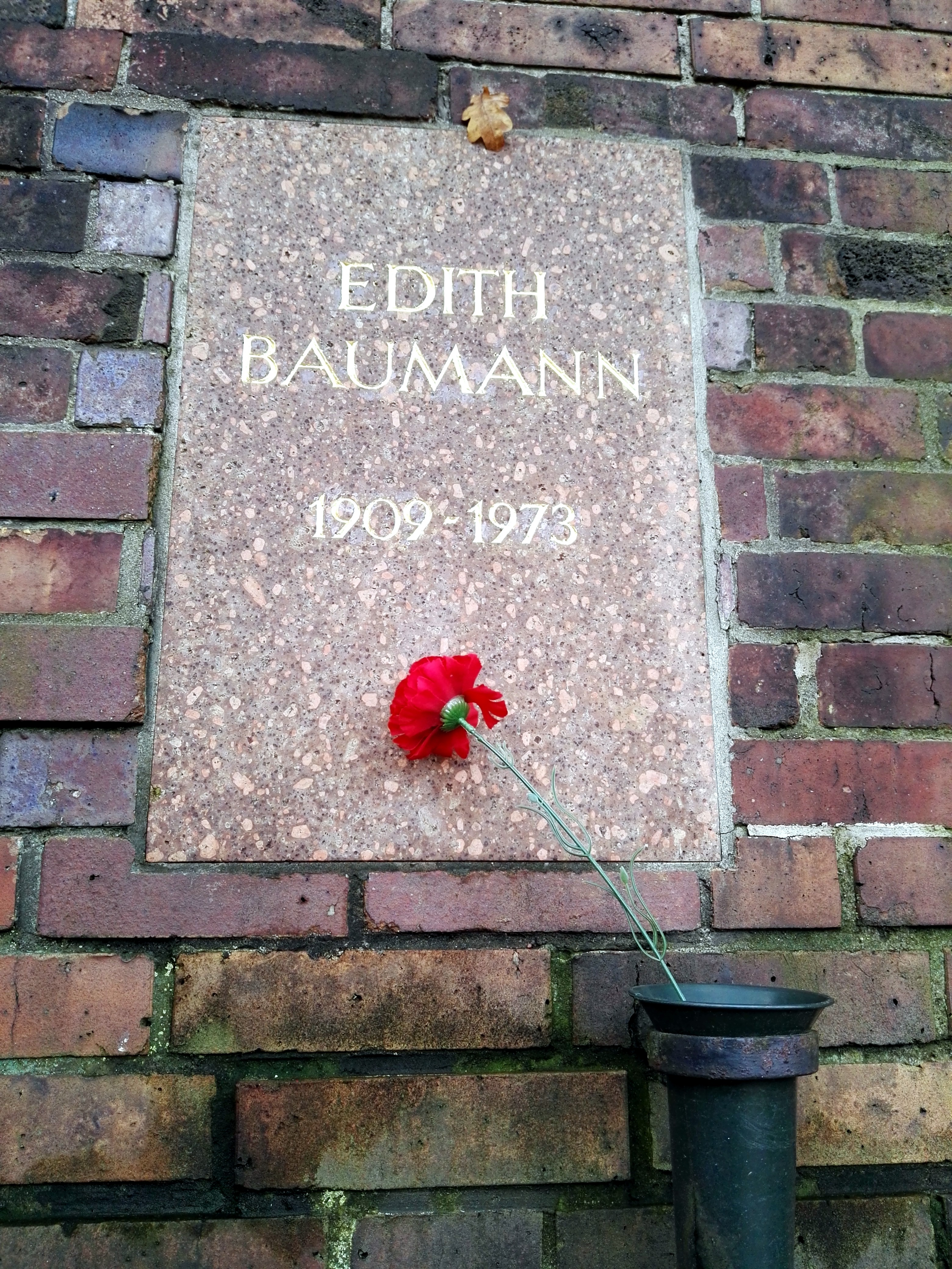 Grab von Edith Baumann in der Gedenkstätte der Sozialisten auf dem Zentralfriedhof Friedrichsfelde in Berlin-Lichtenberg